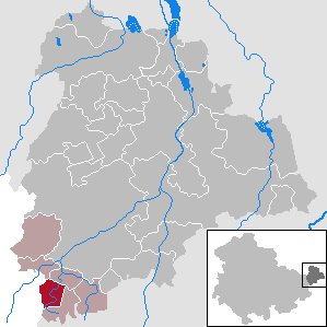 Heukewalde in Thuringia - District Altenburger Land